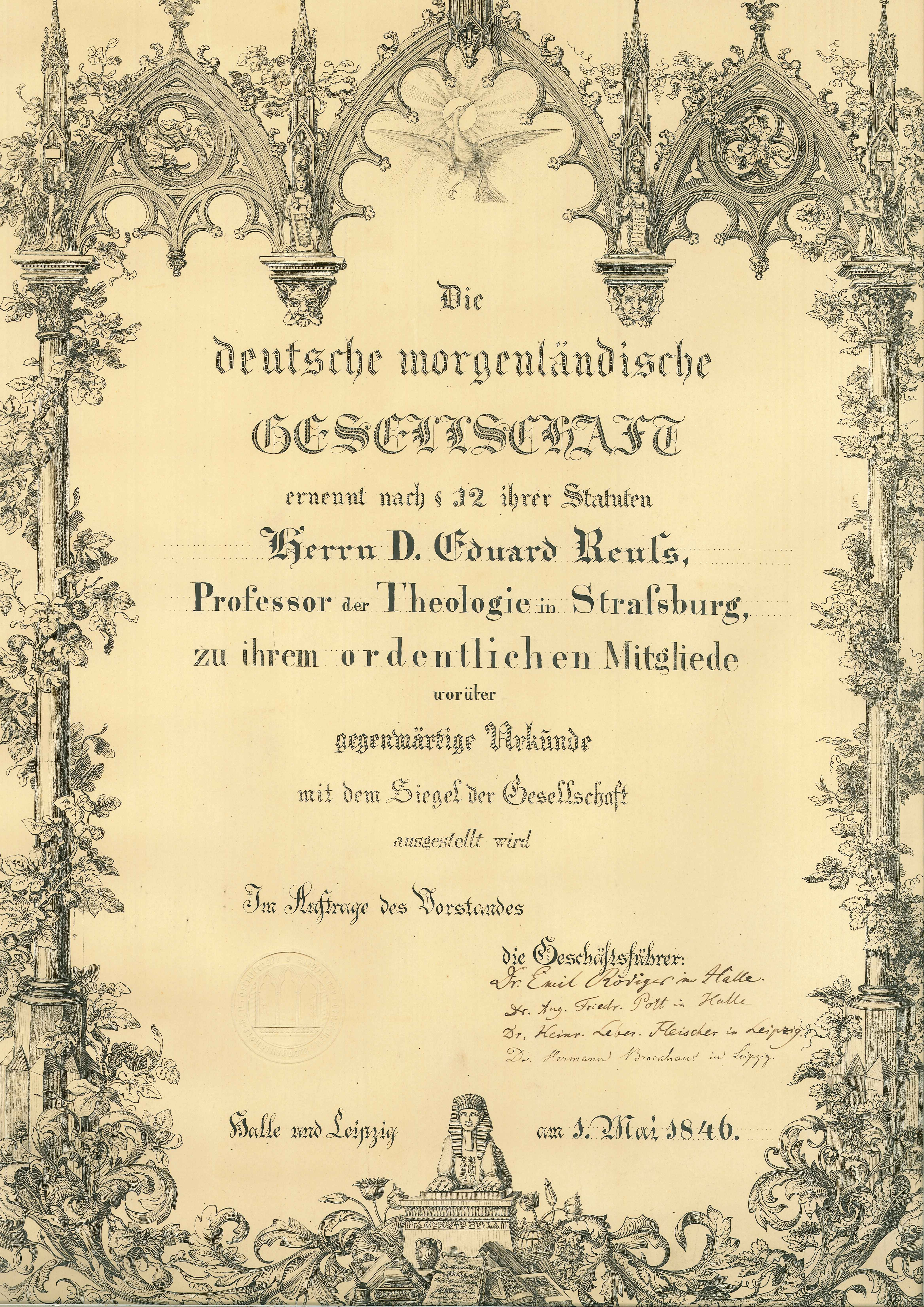 Acceptation d'Edouard Reuss à la Deutsche Morgenländische Gesellschaft en 1846, approuvé par des membres de cette société orientaliste : Emil Rödiger, August Friedrich Pott, Heinrich Leber. Fleischer et Hermann Brockhaus.